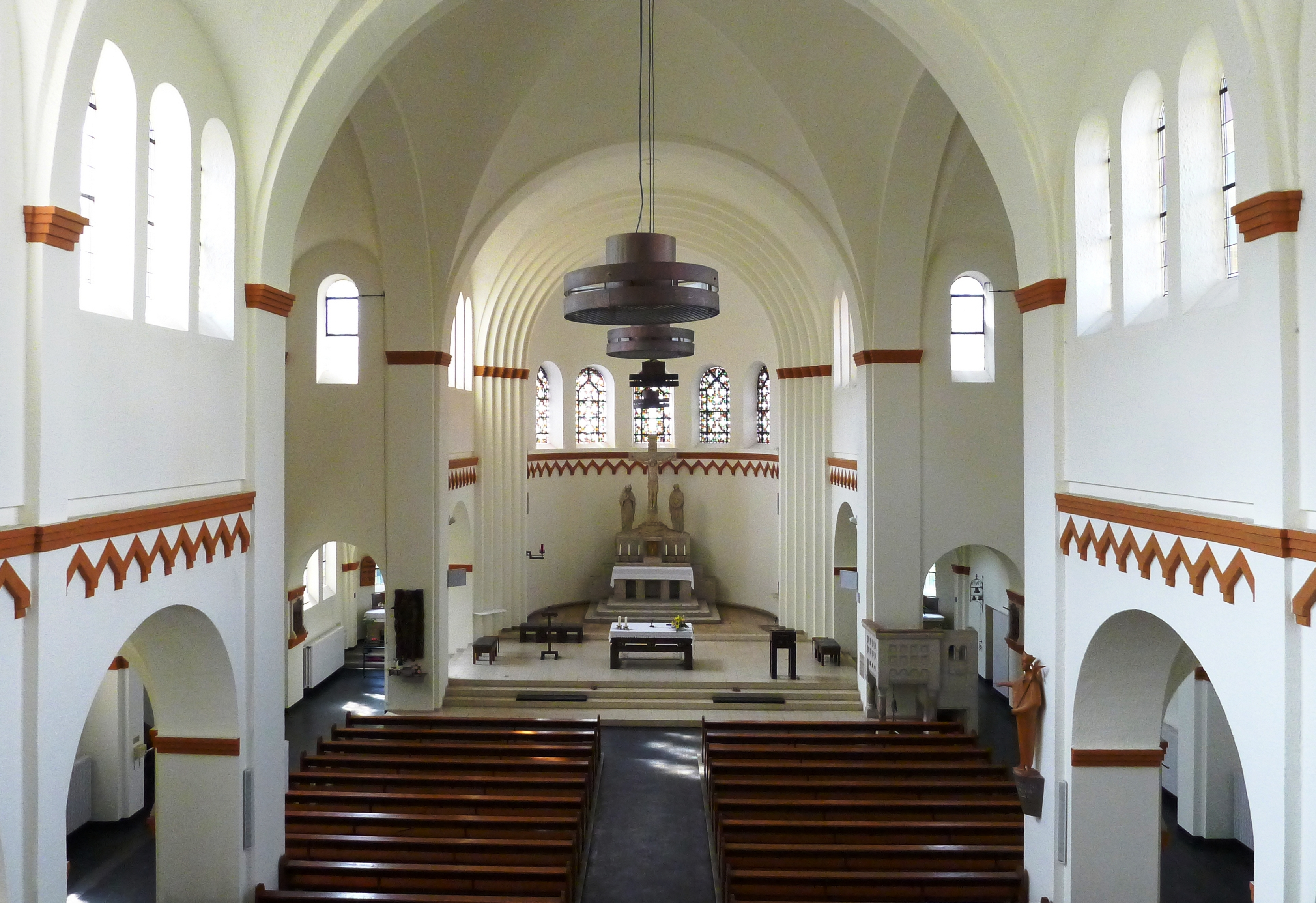 Blick von der Orgelempore